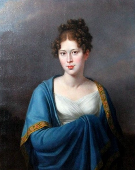 Княгиня Софья Петровна Лобанова-Ростовская, ур. Лопухина (1798—1825), с 1820 года замужем за генерал-лейтенантом князем А. Я. Лобановым-Ростовским (1795—1848).